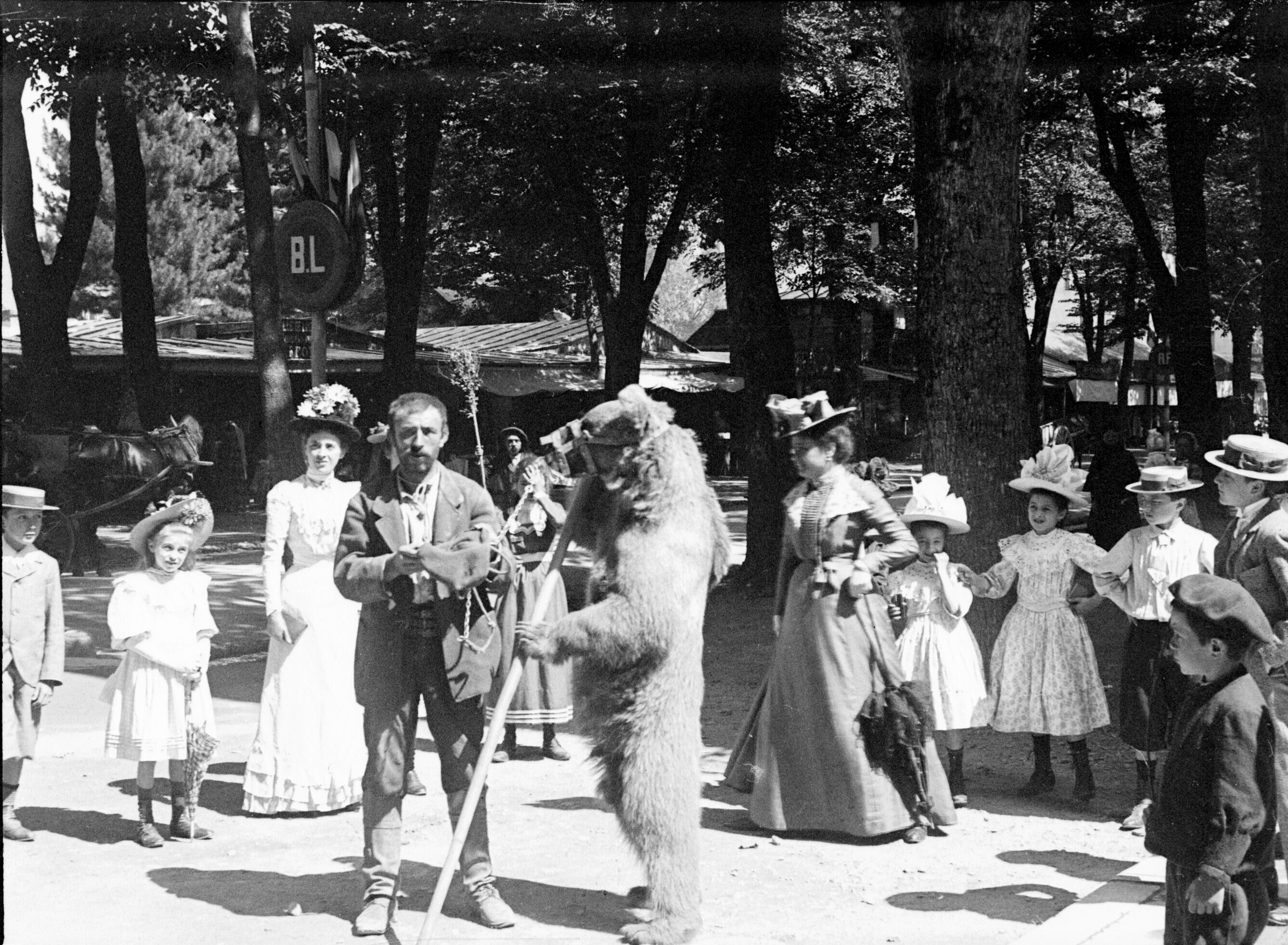 Fonds Trutat - Photographie ancienne Cote : TRU C 43 Localisation : Fonds ancien Original non communicable Titre : Ours, Luchon, septembre 1900 Auteur : Trutat, Eugène Rôle de l’auteur : Photographe Lieu de création : Bagnères-de-Luchon (Haute-Garonne) Date de création : : 1900 Mesures : 5 x 6 cm Observations : Plaque cassée. Mot(s)-clé(s) : -- Homme -- Vache -- Bâton -- Costume masculin -- Montreur d'animaux savants -- Dresseur -- Ours -- Rue -- Art du spectacle -- Bagnères-de-Luchon (Haute-Garonne) -- Pique (France ; vallée) -- Luchonnais, Massif du (France) -- 20e siècle, 1e quart Médium : Photographies -- Négatifs sur plaque de verre -- Noir et blanc -- Portraits de groupe -- Scènes de rue Bibliothèque de Toulouse. Domaine public